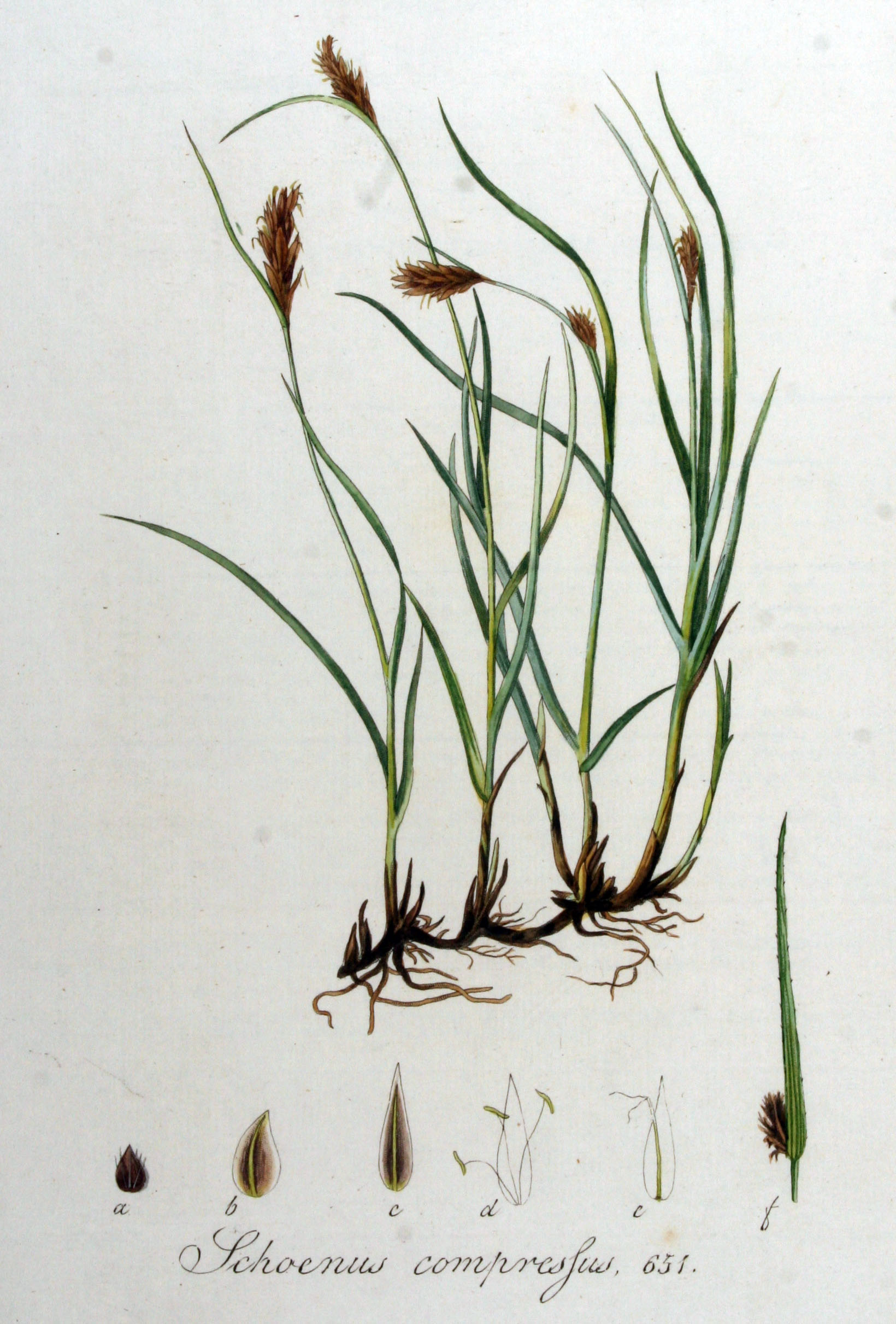 Blysmus compressus (L.) Panzer ex Link (Syn. Schoenus compressus L.)